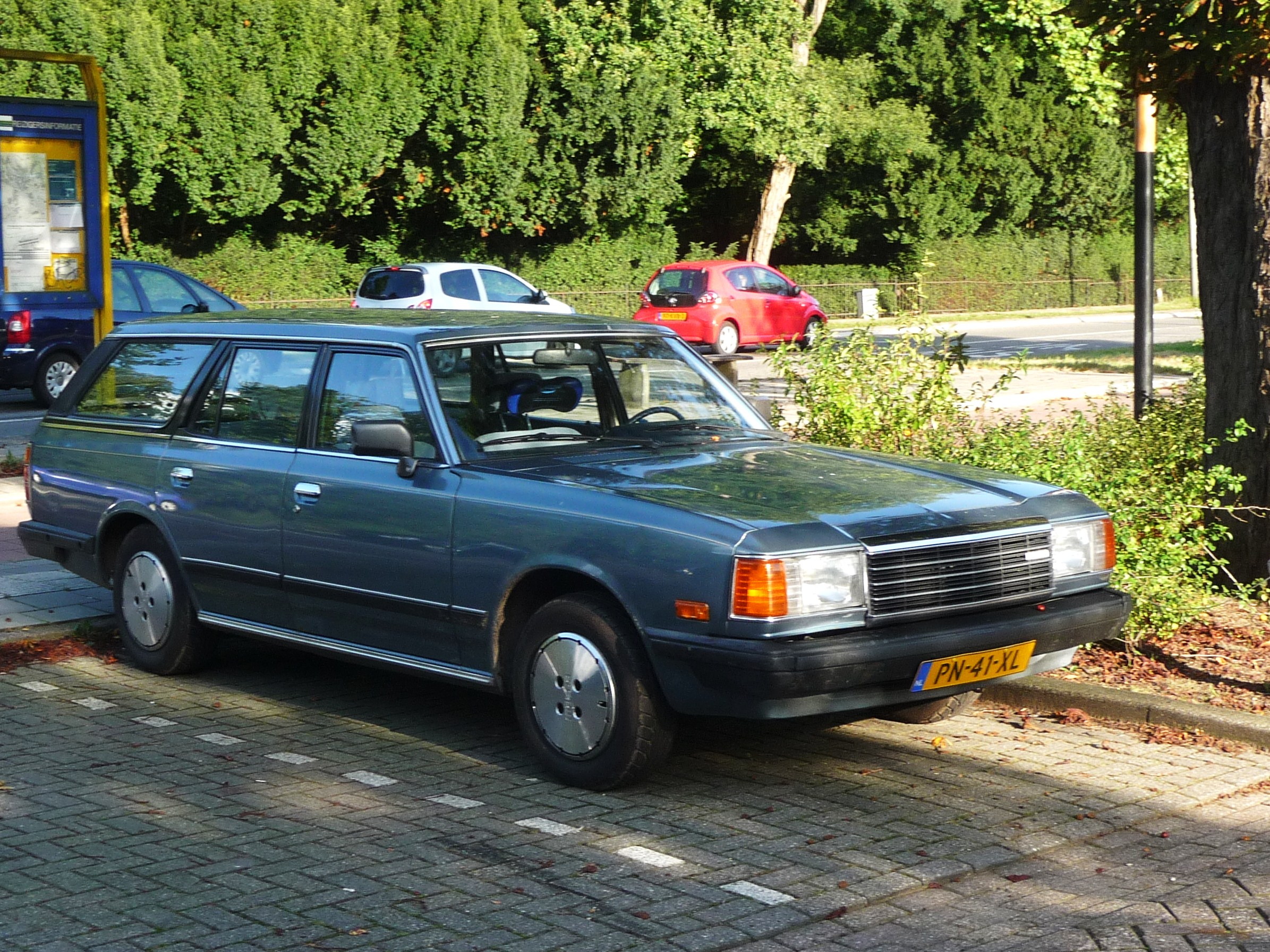 PN-41-XL